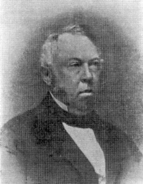 Бразоль Євген Григорович